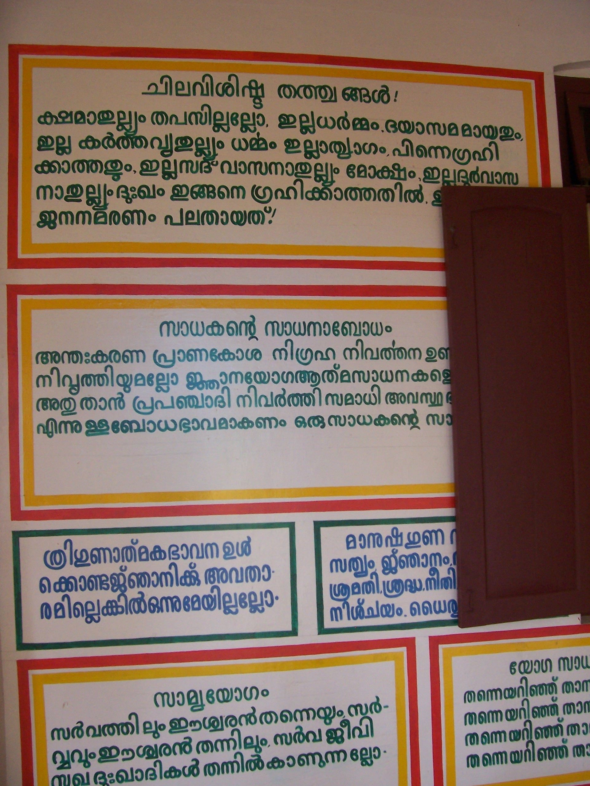 Inscriptions en Malayalam dans l'ashram sivananda du Kerala.